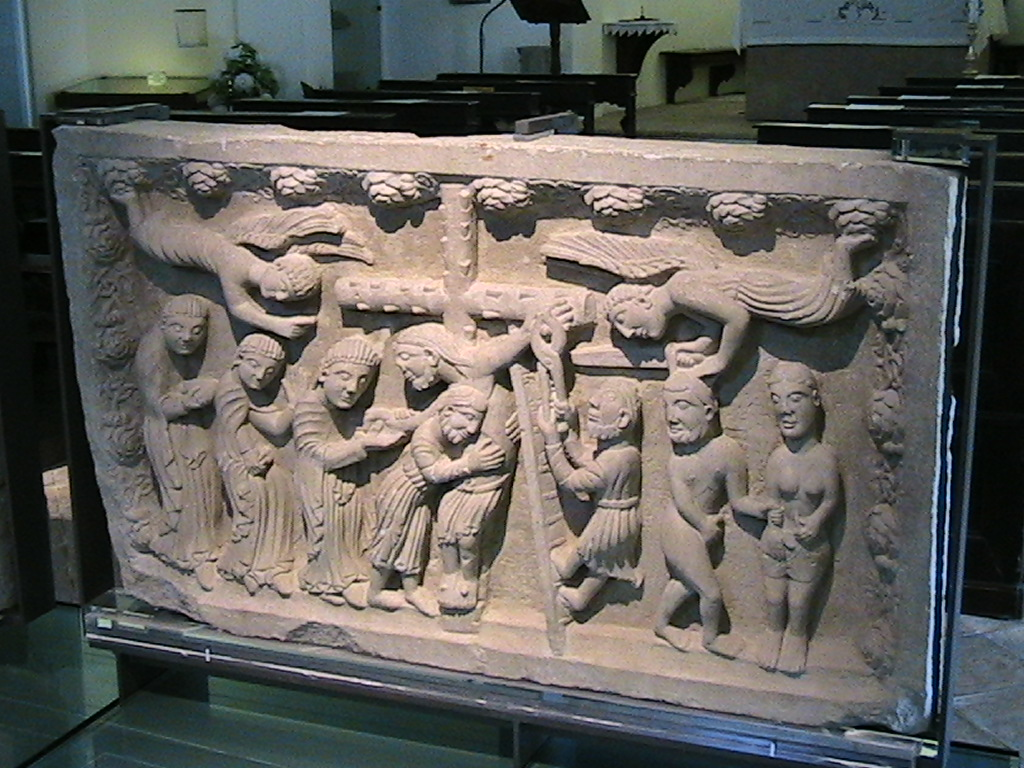 Bardone (Terenzo) - sculture di scuola antelamica